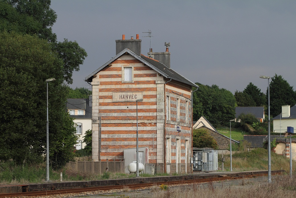 La gare d'Hanvec en août 2011, Bretagne, France.